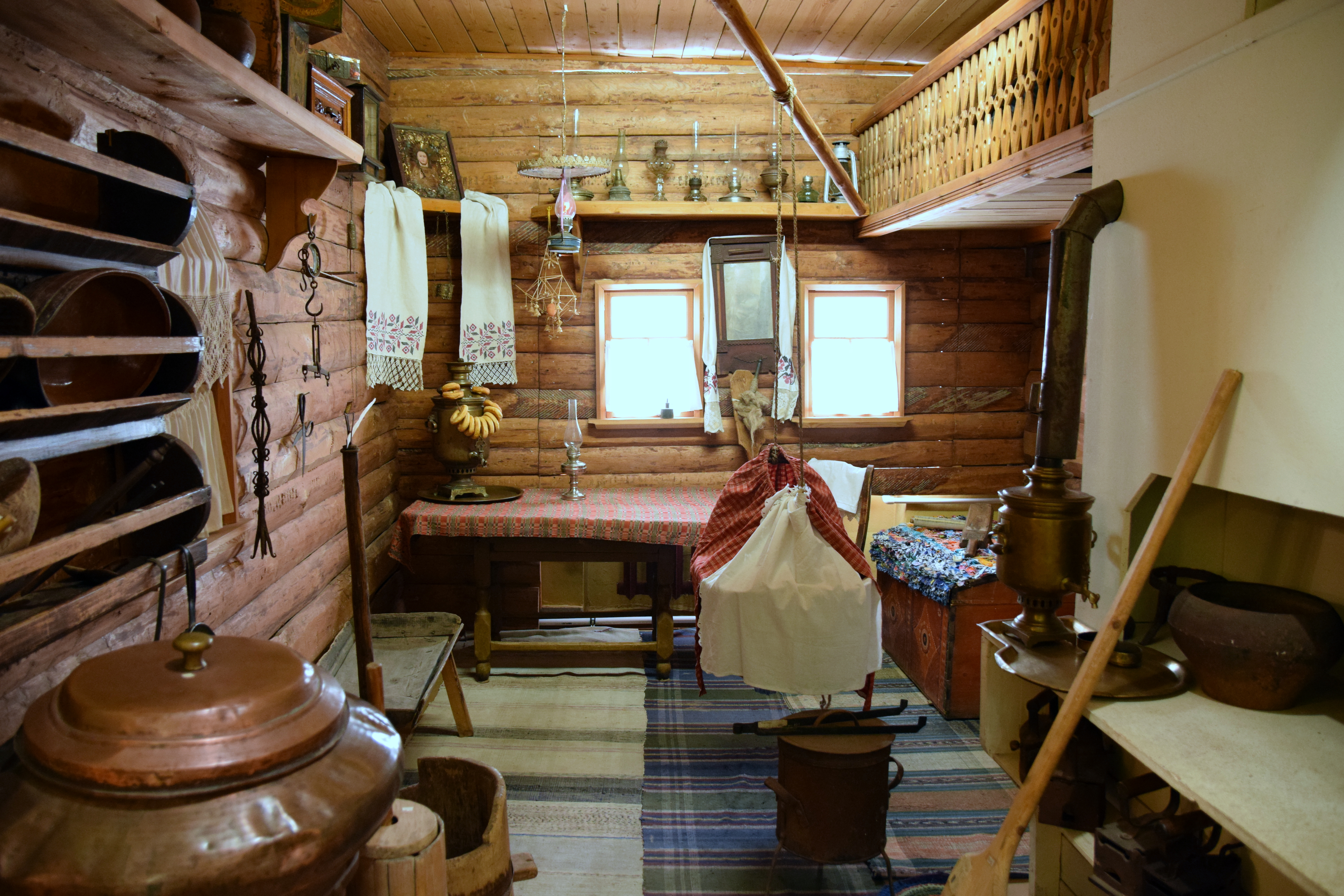 Экспозиция музея истории крестьянства в пос. Ленинская искра Котельничского района Кировской области This image has been uploaded for Wikivoyage travel guide on Кировская область